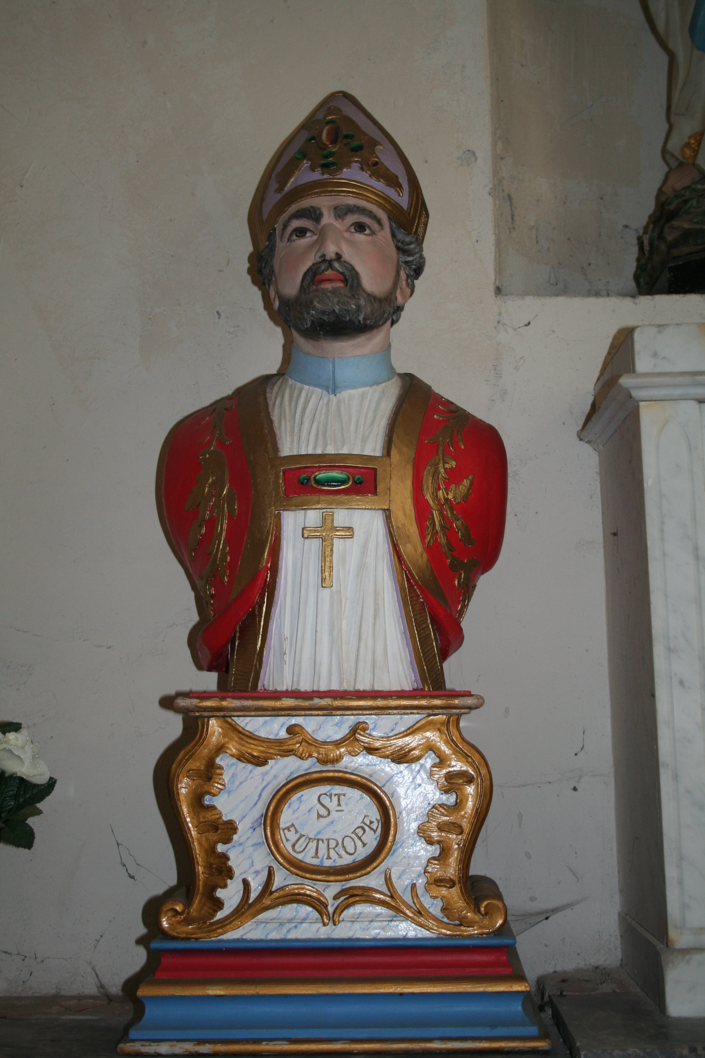 Castanet-le-Haut (Hérault) - buste de Saint-Eutrope, saint faisant l'objet d'une dévotion particulière dans le village. Son pèlerinage avait lieu le 30 avril.